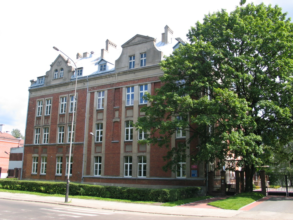 Budynek przy ul Tylnej 3 w Łodzi